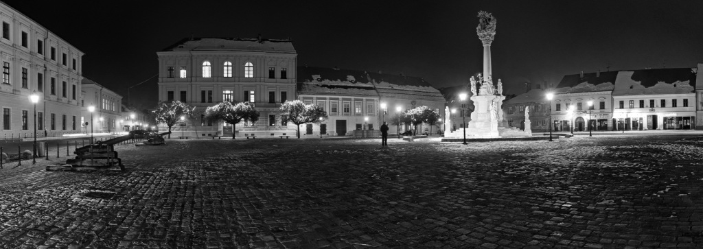 Osječka tvrđa noću. Kružni pil.